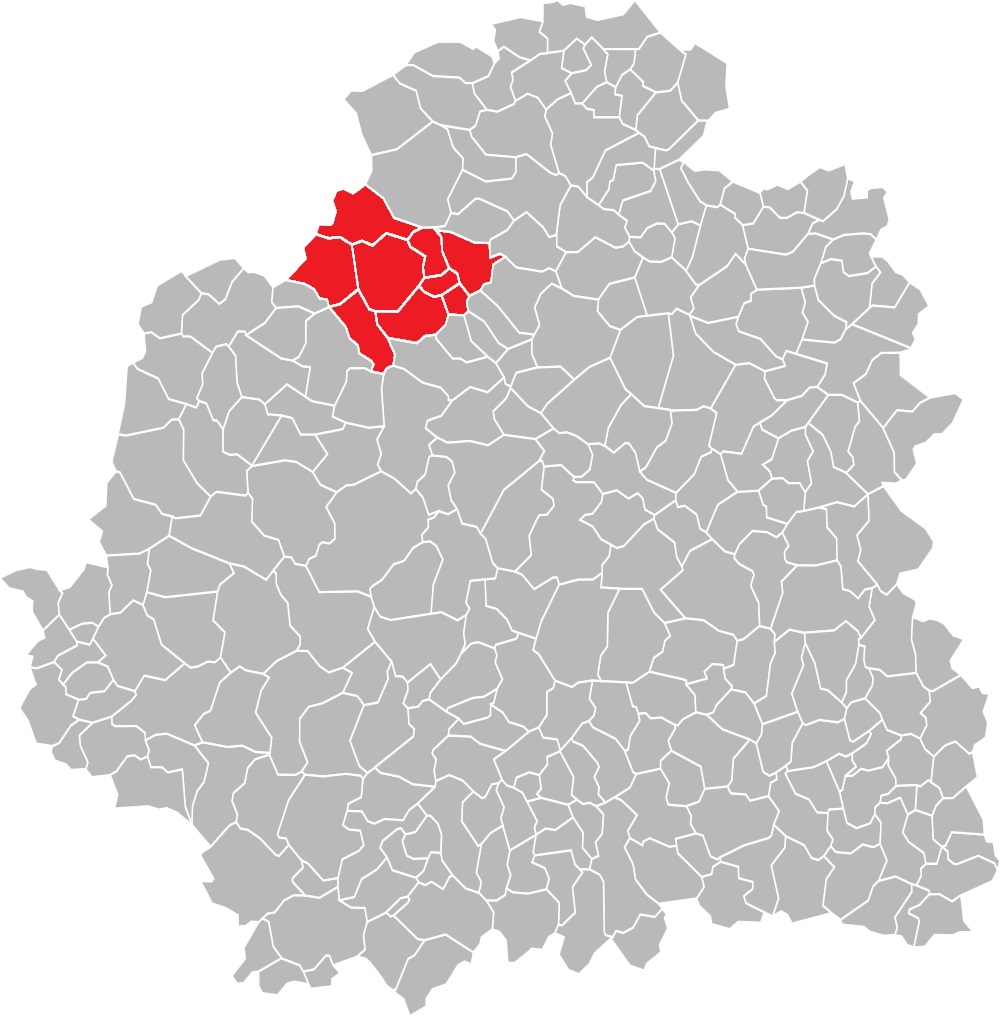 Carte des communes de l'Indre (36) : Le canton d'Écueillé, de 1790 à 2015.